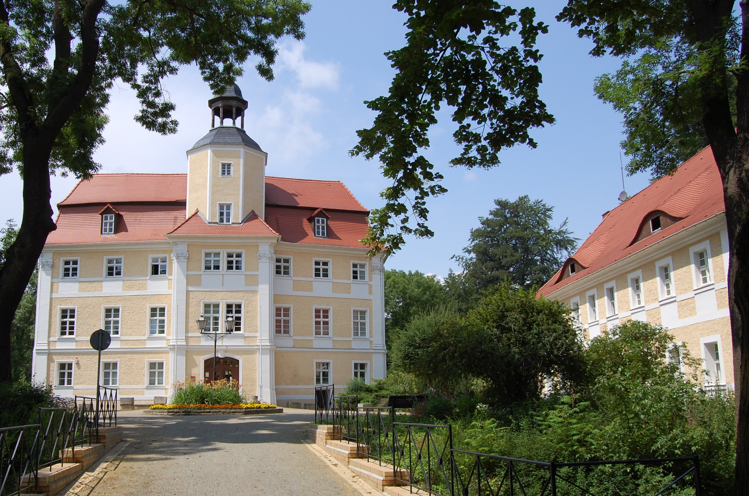 Schloss Vetschau Hornjoserbsce: Wětošowski hród